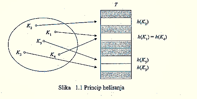 princip heširanja